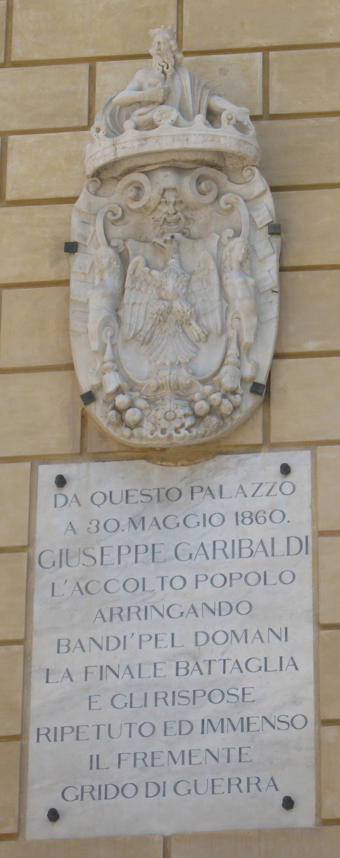 Palazzo Pretorio di Palermo, lapide a Garibaldi posta il 27 maggio 1885 (vedi Archivio storico siciliano, Volumi 47-48, p. 47, 1927)